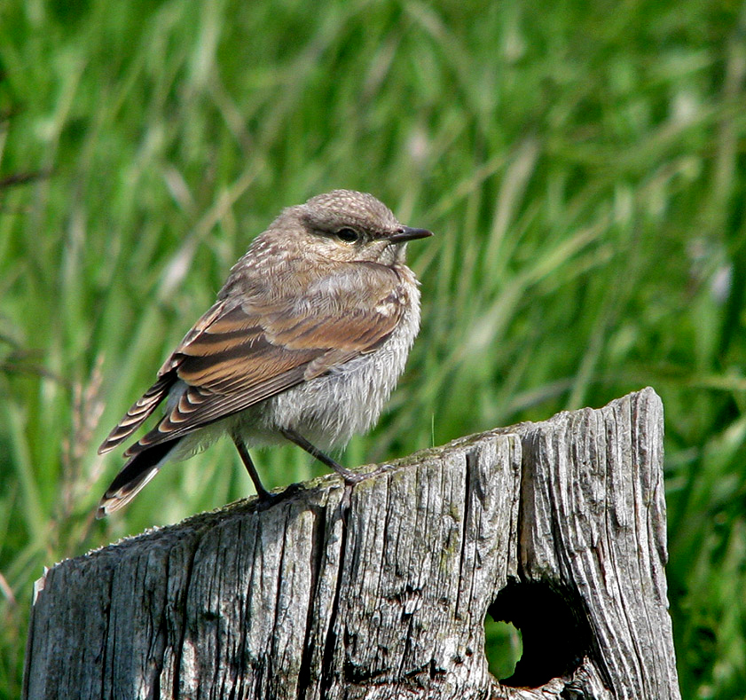 En ungfågel av Stenskvätta / Oenanthe oenanthe